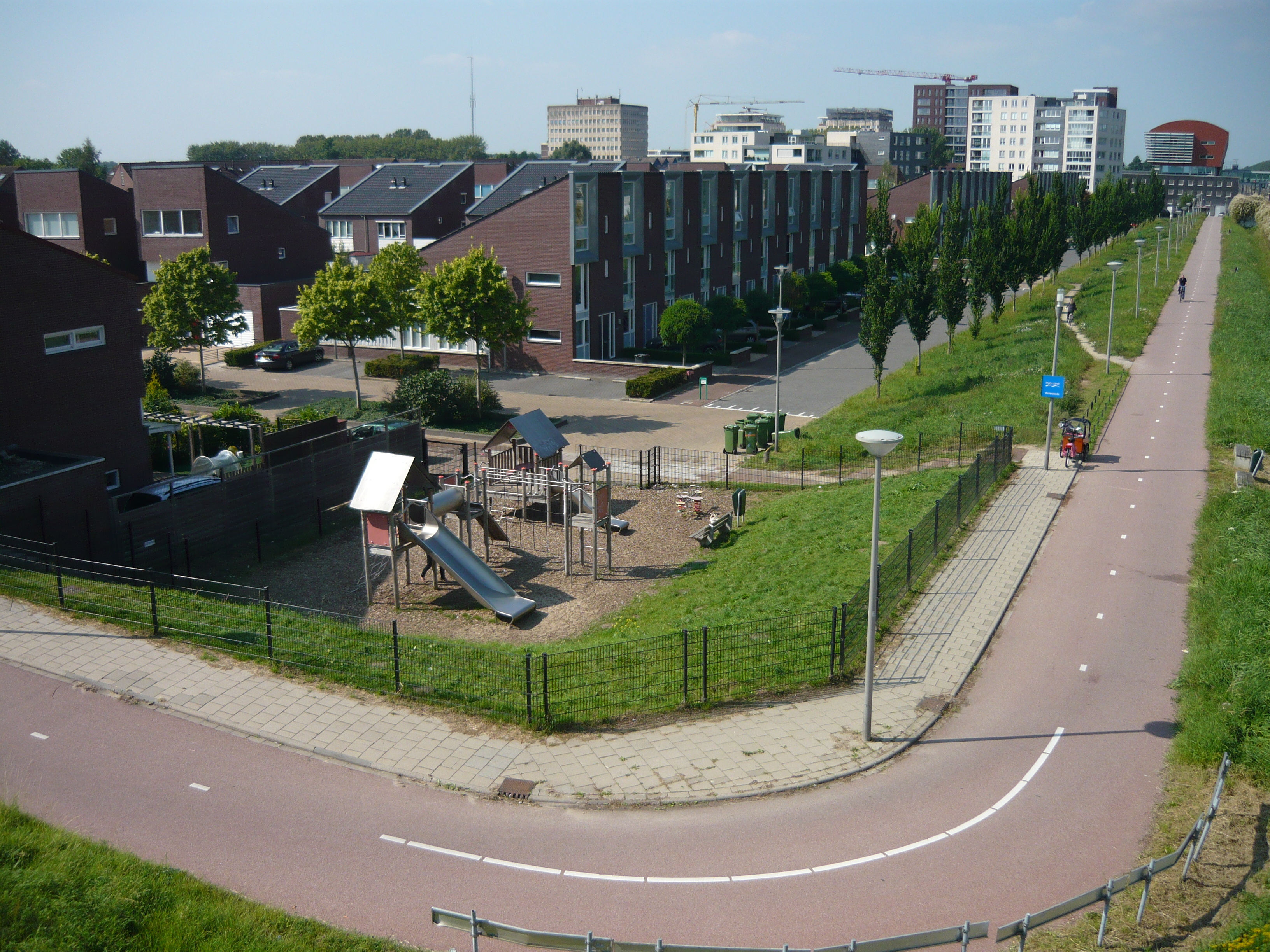 Maarssenbroek met de woonwijk Waterstede en in de achtergrond hoogbouw van Bisonspoor